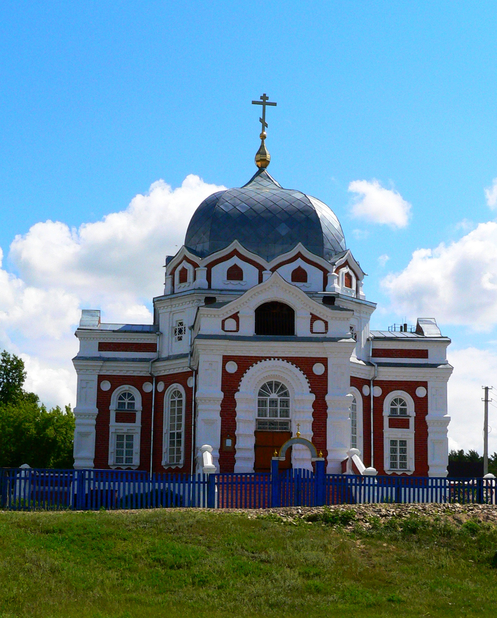 Церковь каменная на Каракане: улица Совхозная, 47, Завьялово, Искитимский район, Новосибирская область